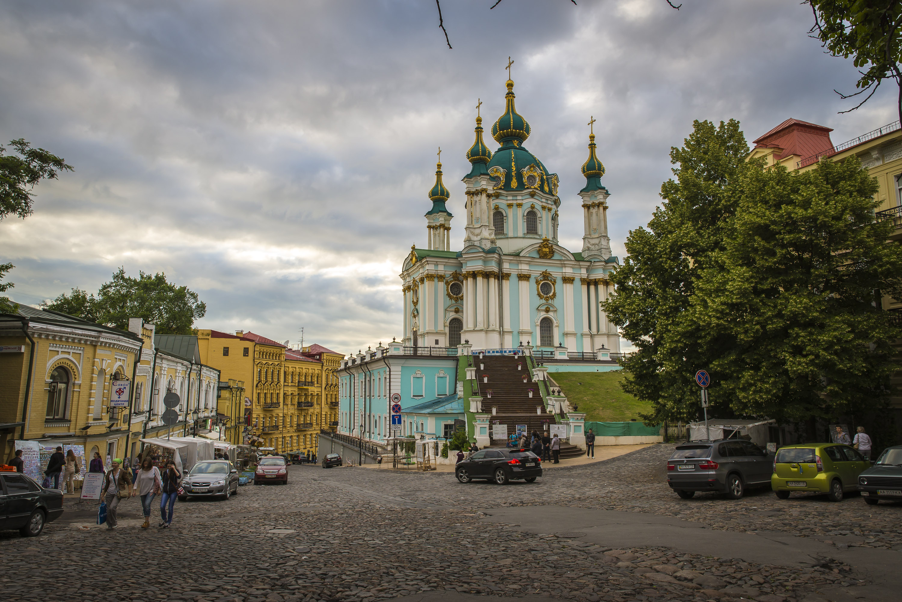 Церква Андріївська, Київ, Андріївський узвіз, 23